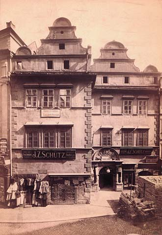 Štítový renesanční Melantrichův dům s arkádovým nádvořím čp. 471 ve stejnojmenné ulici byl zbořen v r. 1893